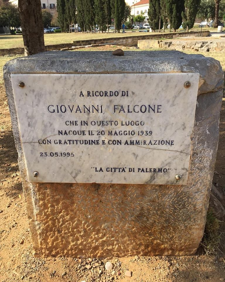 Lapide posta nel luogo in cui nacque Giovanni Falcone; Piazza Magione, Palermo